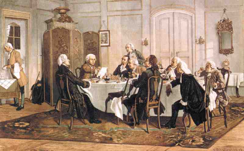 Kant bei seinem Mittagsmahl, Gemälde von 1892/1893